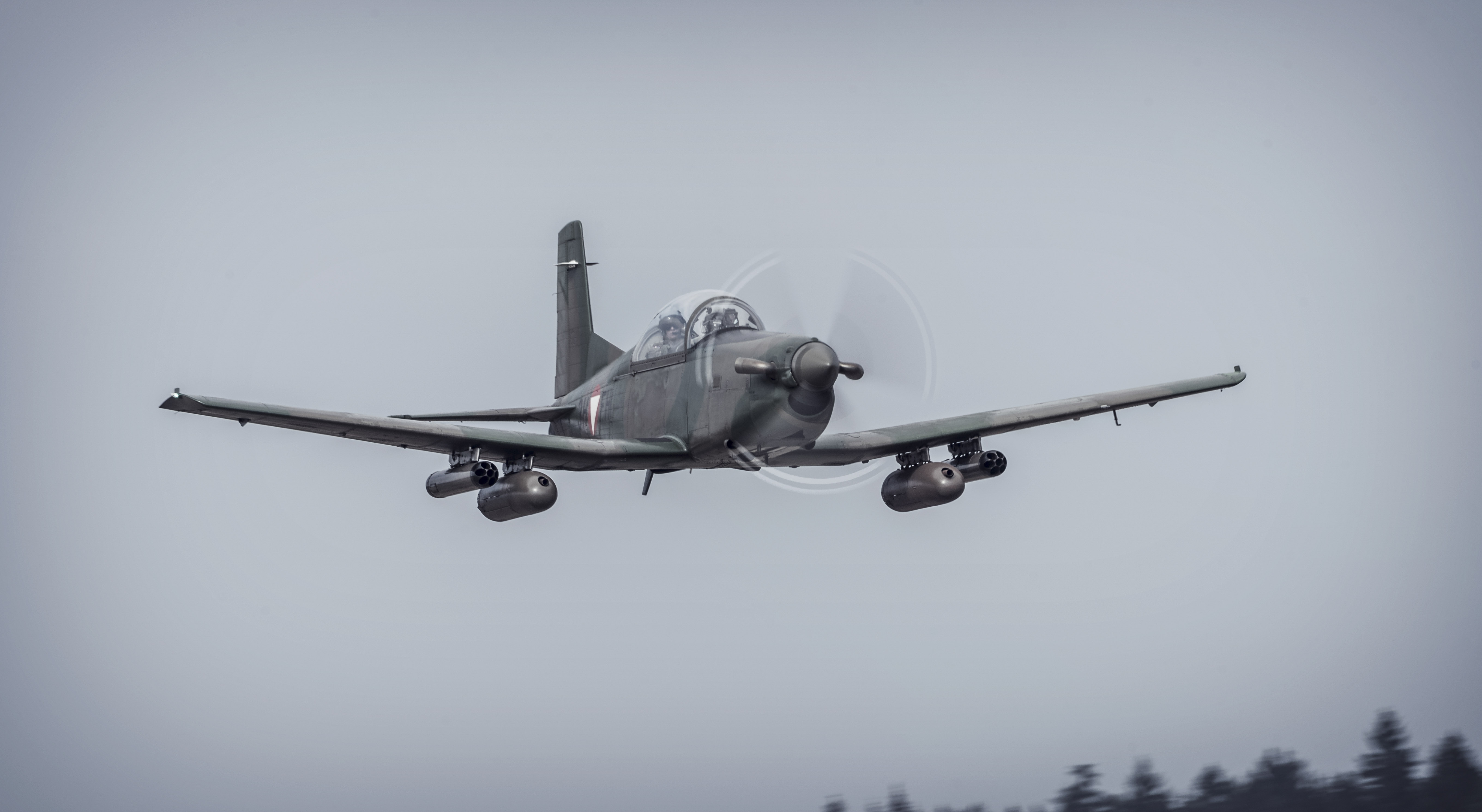 Eine PC7-Maschine bei der "GGSA 2016".